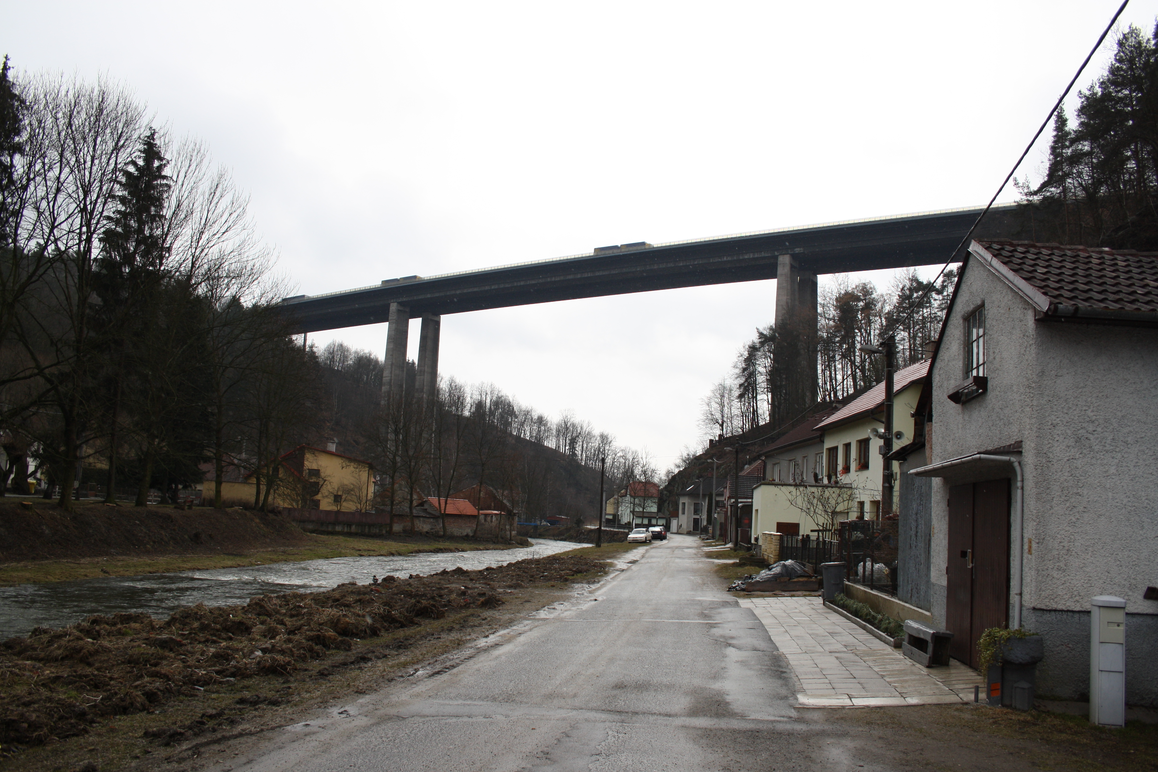 Velké Meziříčí, most Vysočina